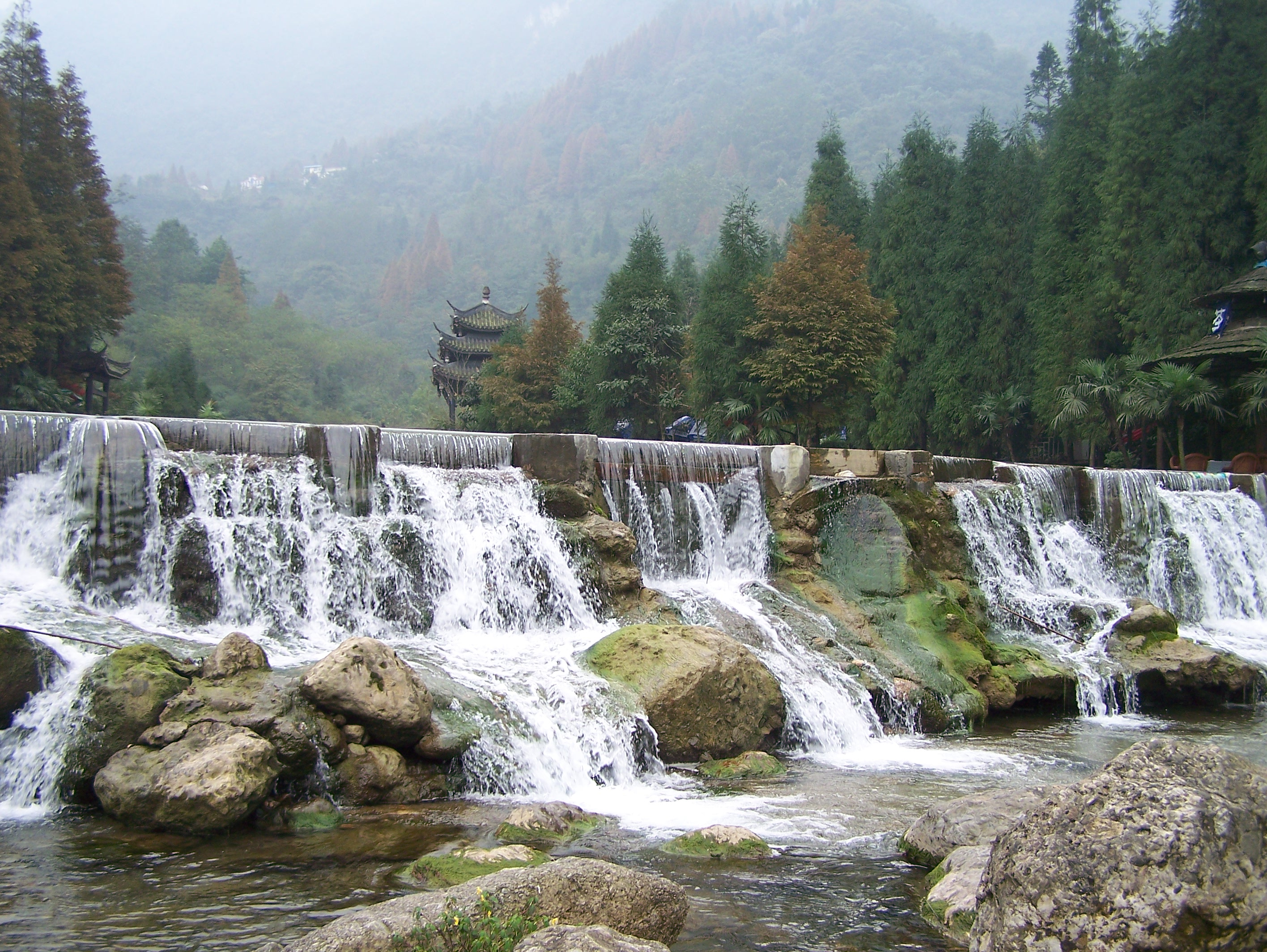 Mount Qingcheng, WuLong Gou